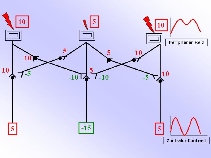 selbst erstellt